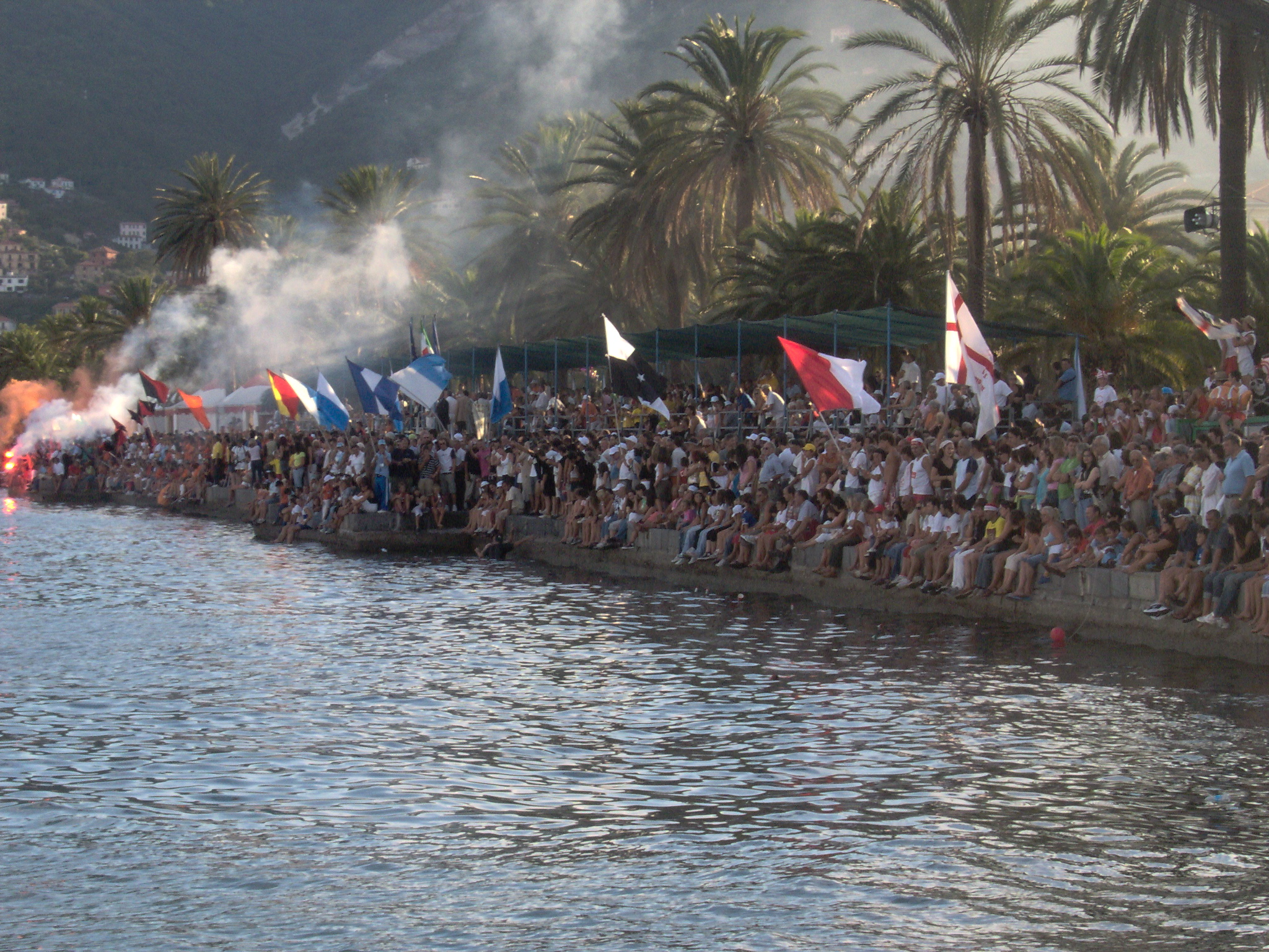 La Spezia - Festa del mare; onori ai caduti del mare